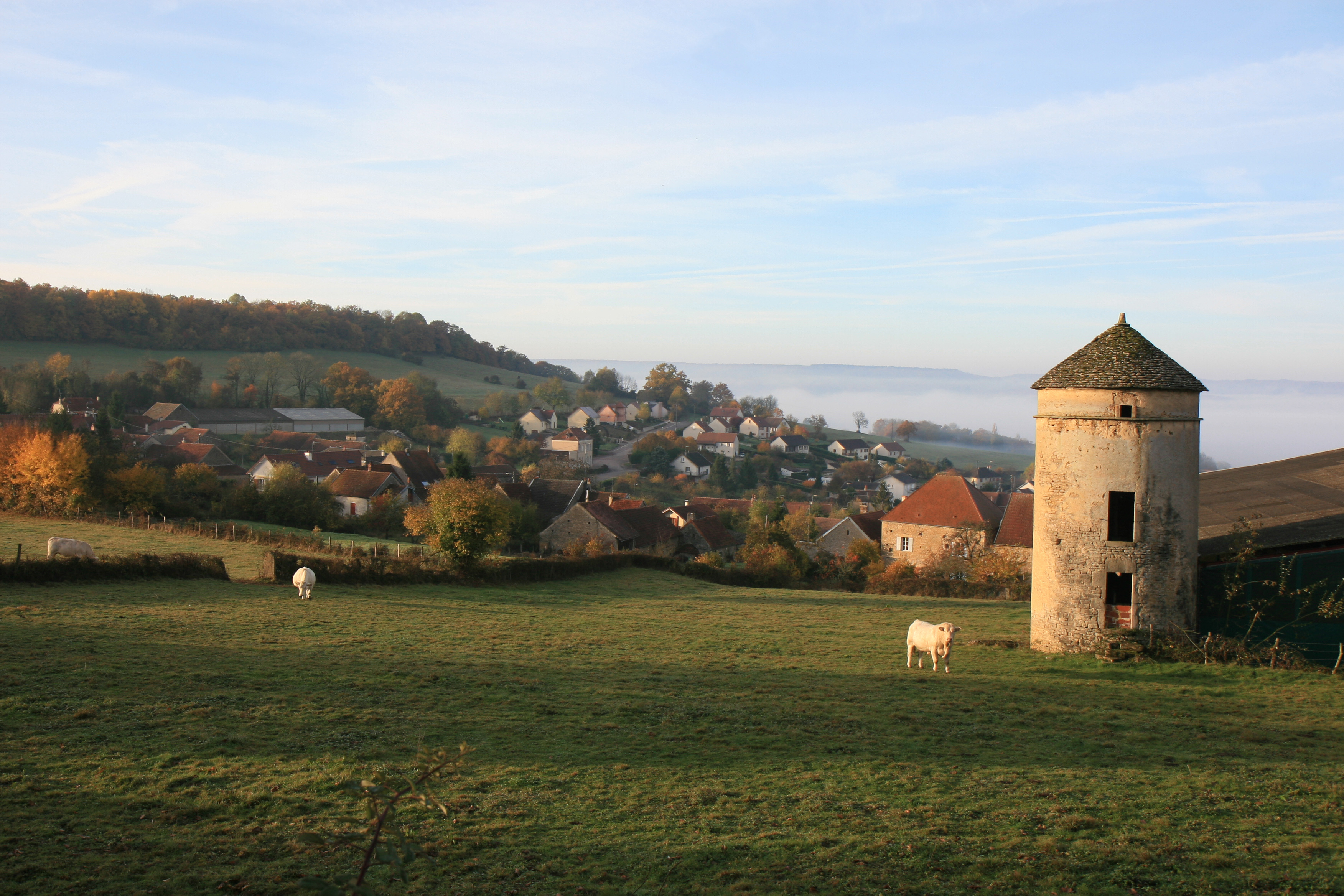 Ménétreux-le-Pitois - Vue du village depuis le plateau le surplombant